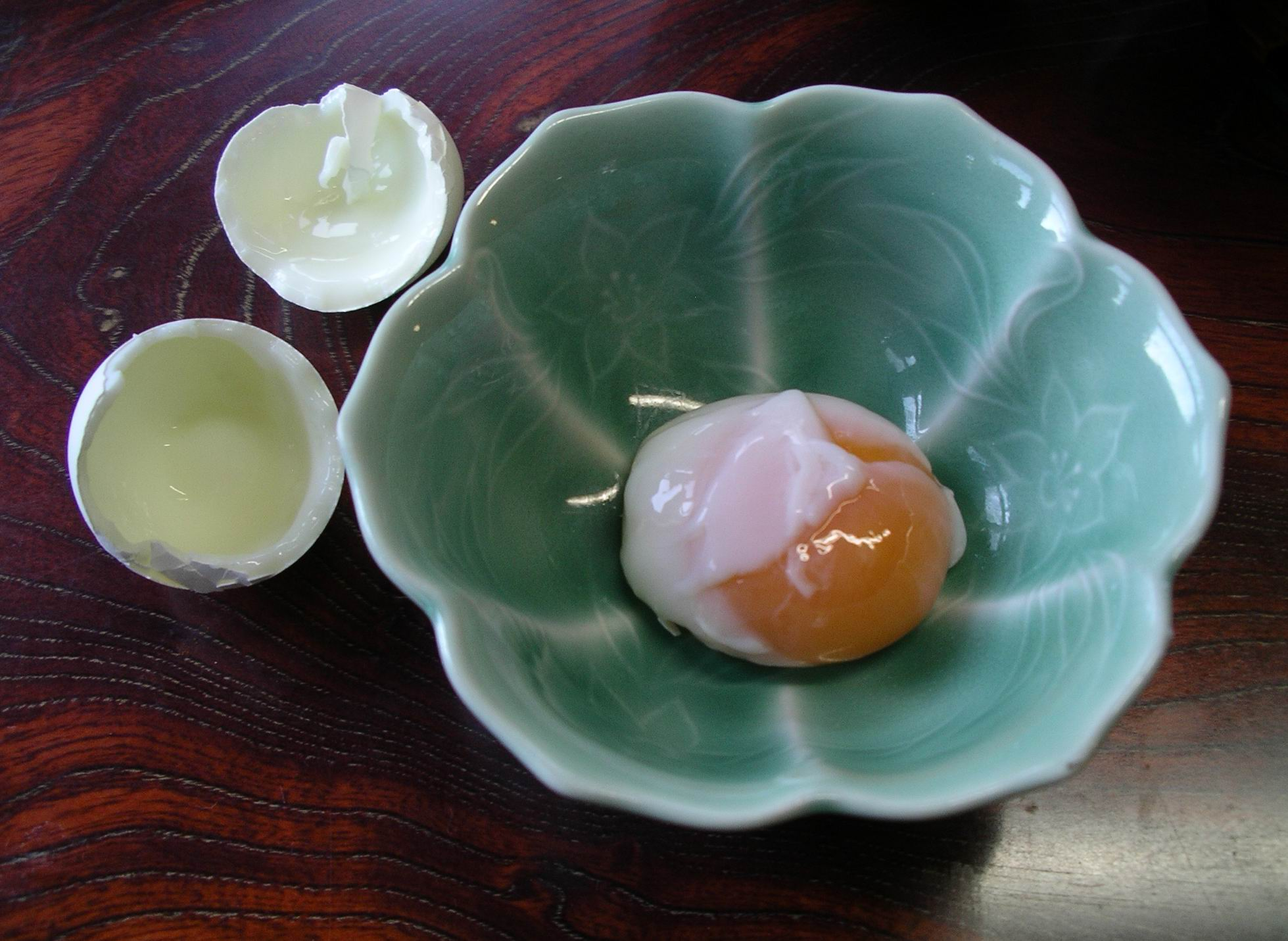 Onsend tamaga at Minshuku Korakuen, Nagano. More here: Up and Down Japan